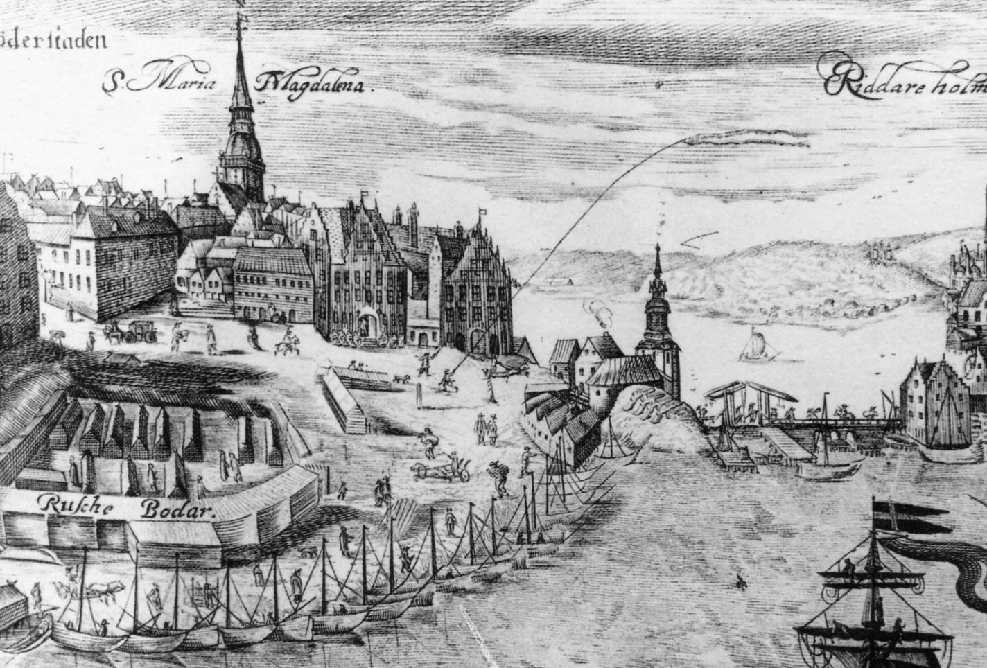 Kopparstick (del av) utfört av Wolfgang Hartmann, vy över det nyreglerade Södermalmstorg på Södermalm i Stockholm